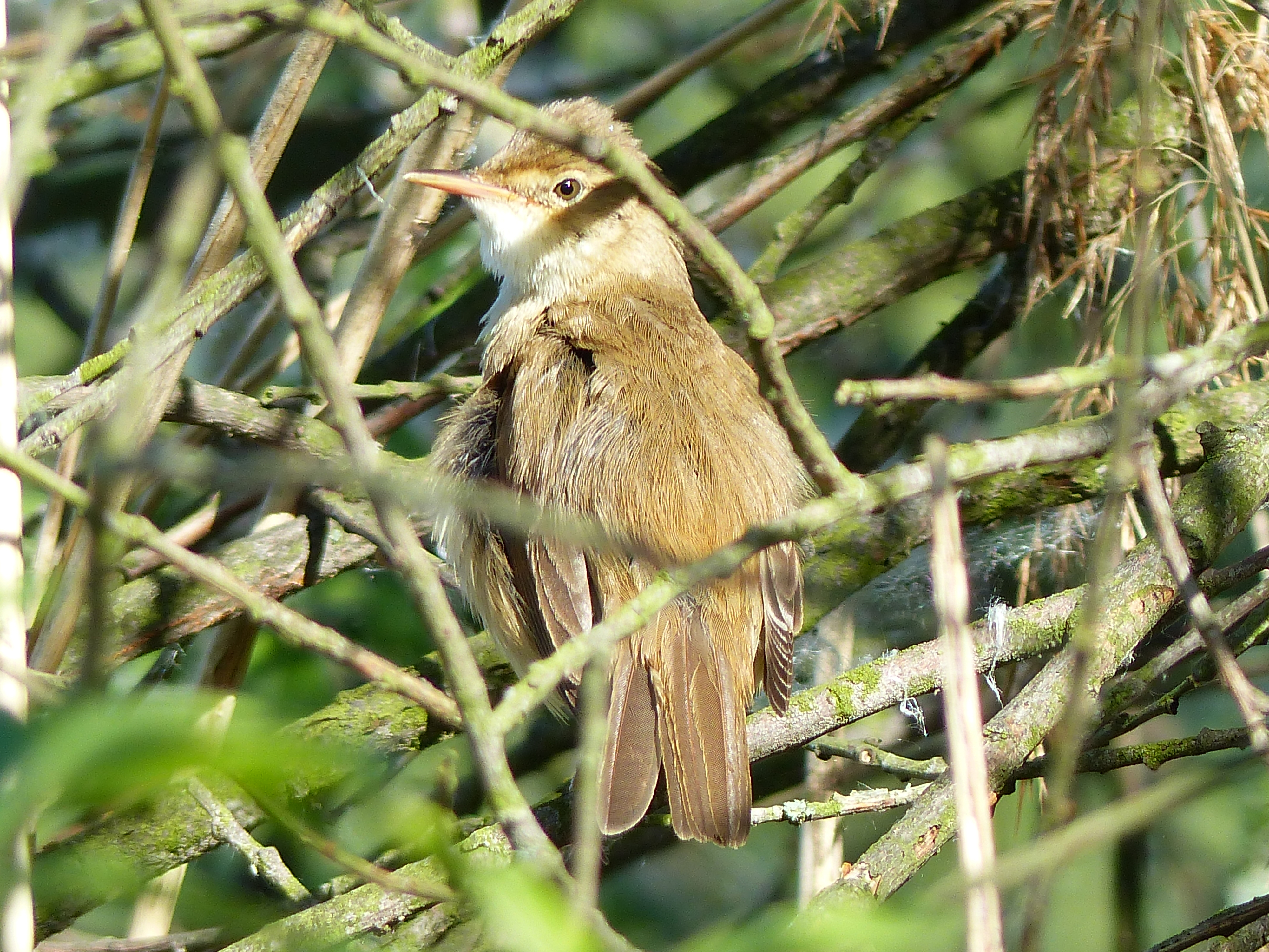 Naturdenkmal Birkwitzer Graben, Birkwitz, Pirna